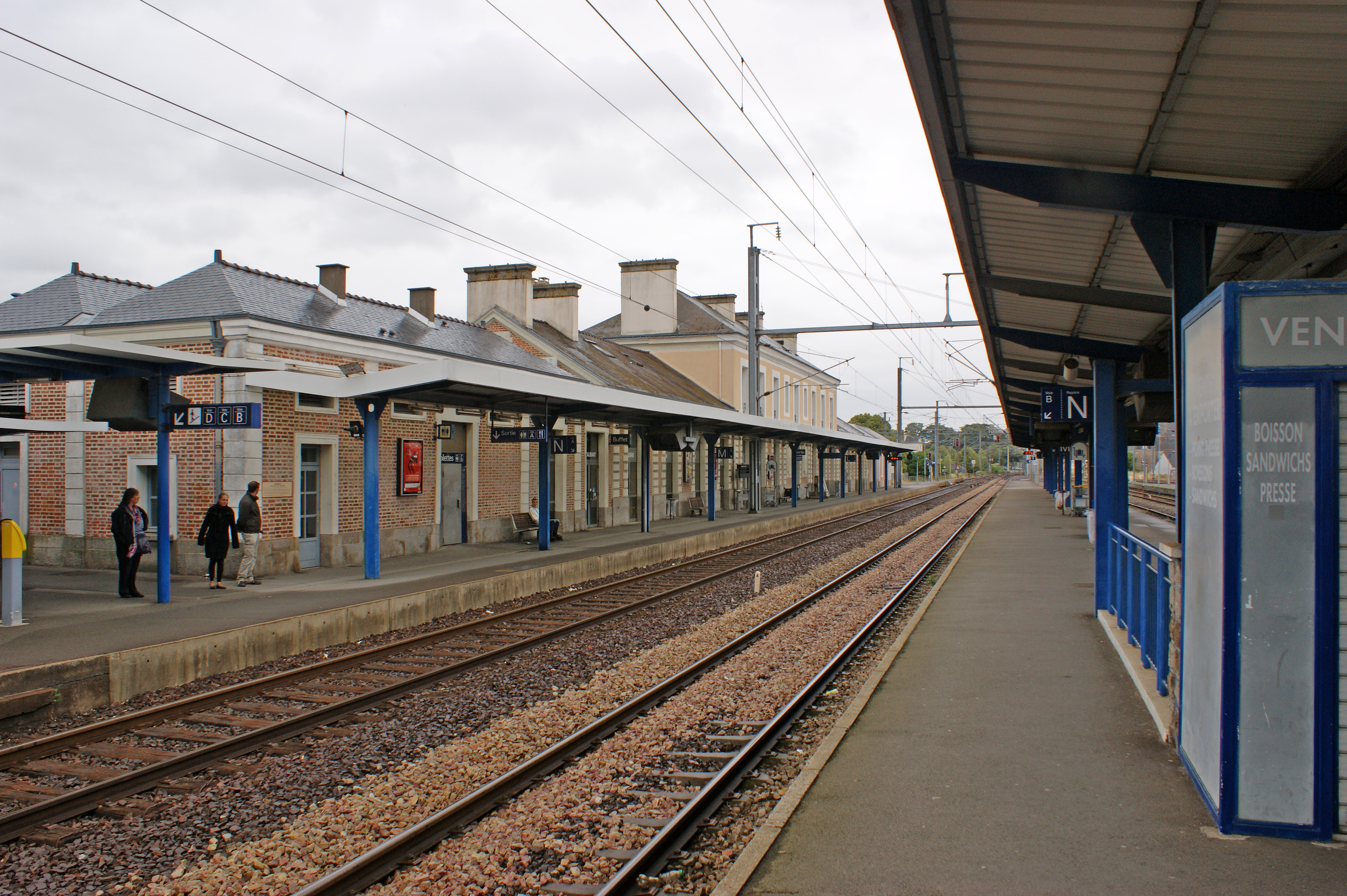 Intérieur de la gare de Redon, le bâtiment voyageurs et son quai latéral, vu du premier quai central.